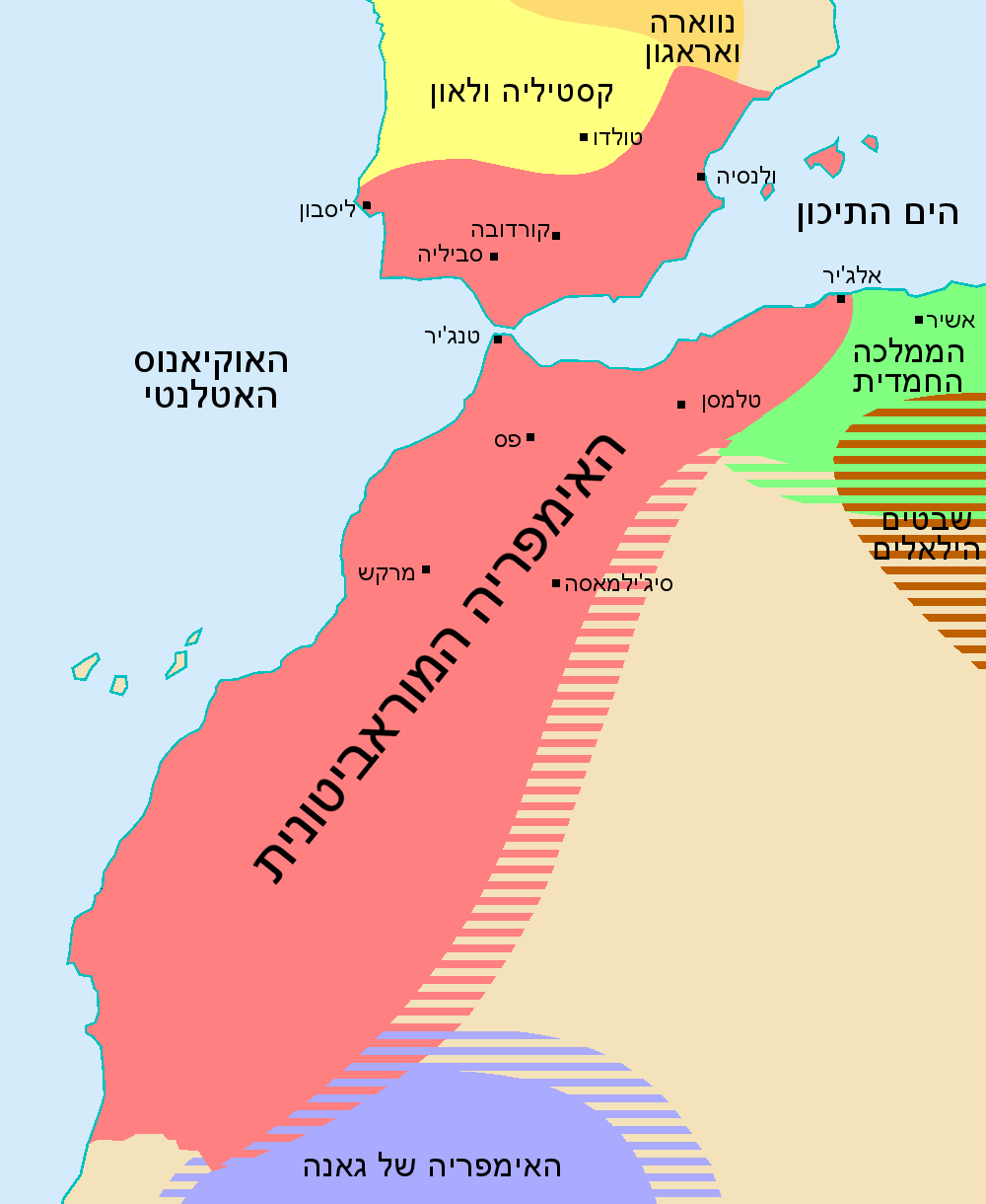 Almoravides